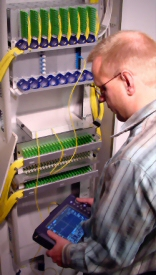 een voorbeeld van een OTDR in gebruik